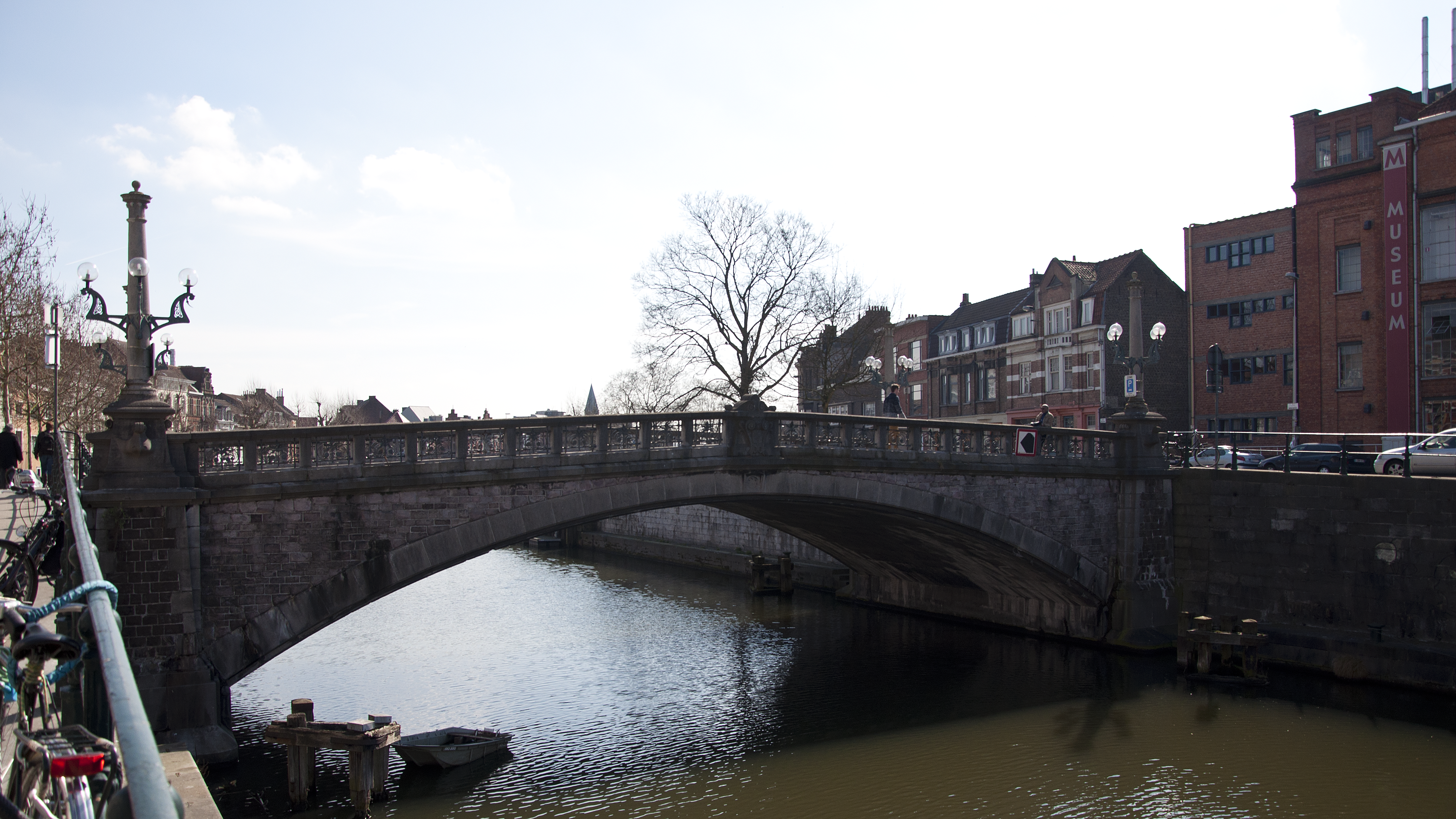 De Minnemeersbrug te Gent